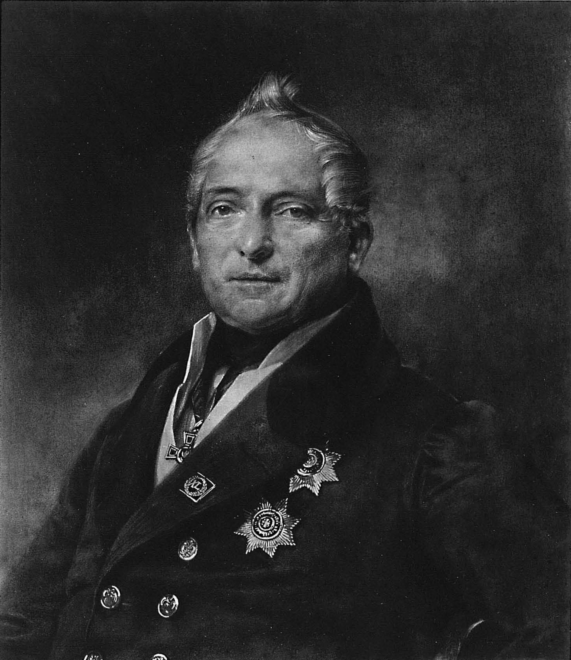 Пётр Яковлевич Убри (1775-1847)